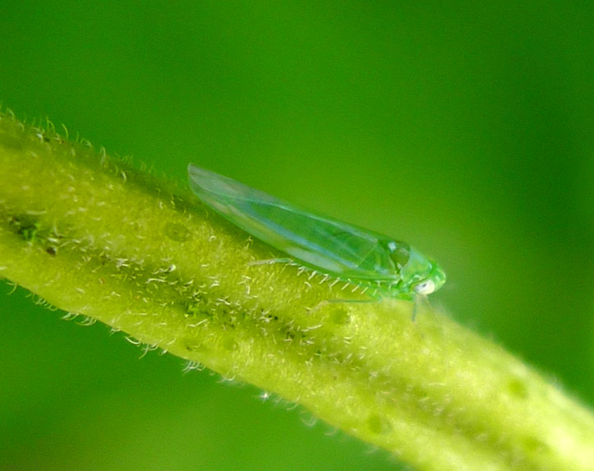 SO 7347